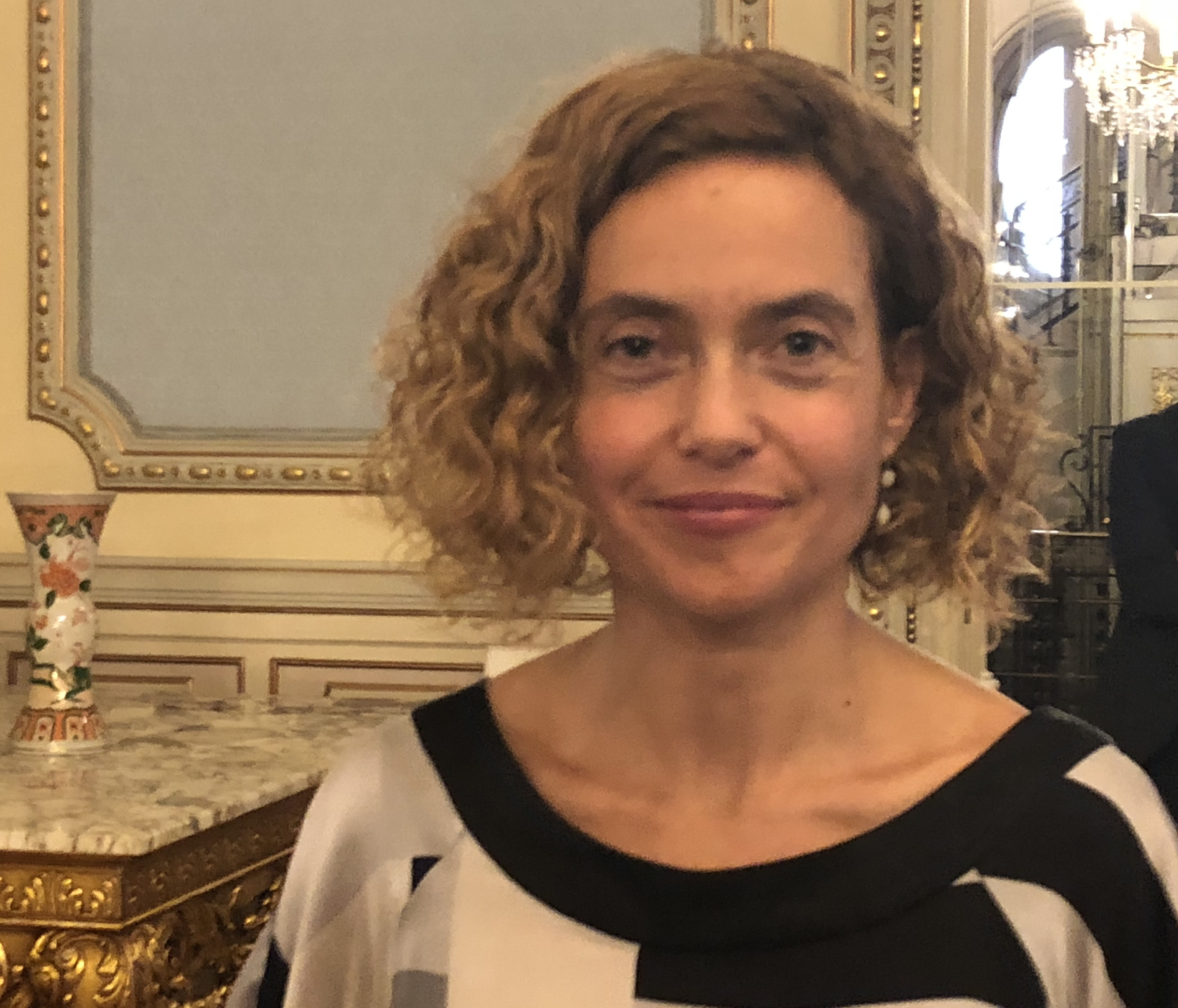 Batet en el Ministerio de Política Territorial y Función Publica